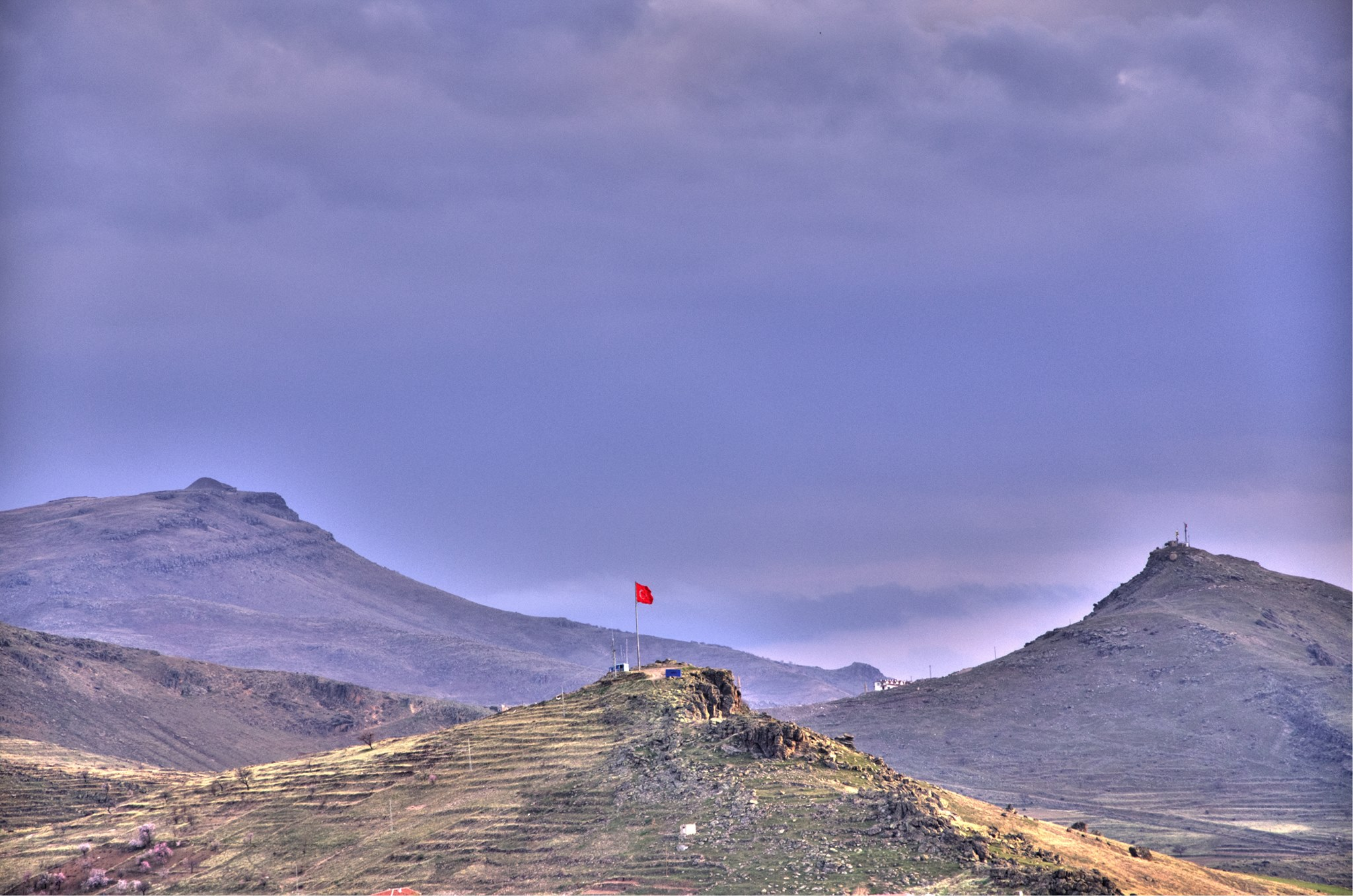 Develi'de bir tepenin GIMP'le düzenlenmiş hali.